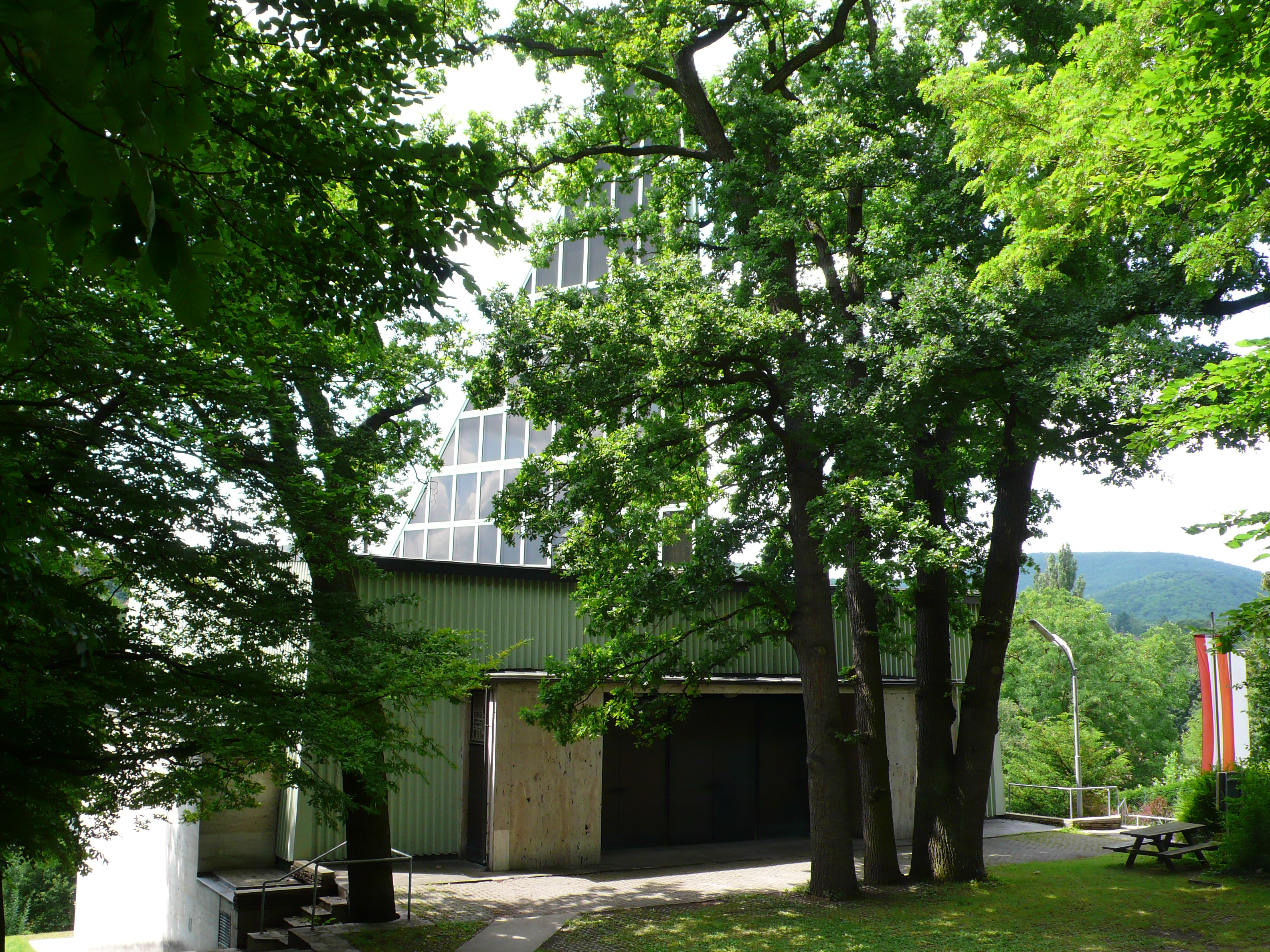 Kordonkirche, Penzing, Wien 14.